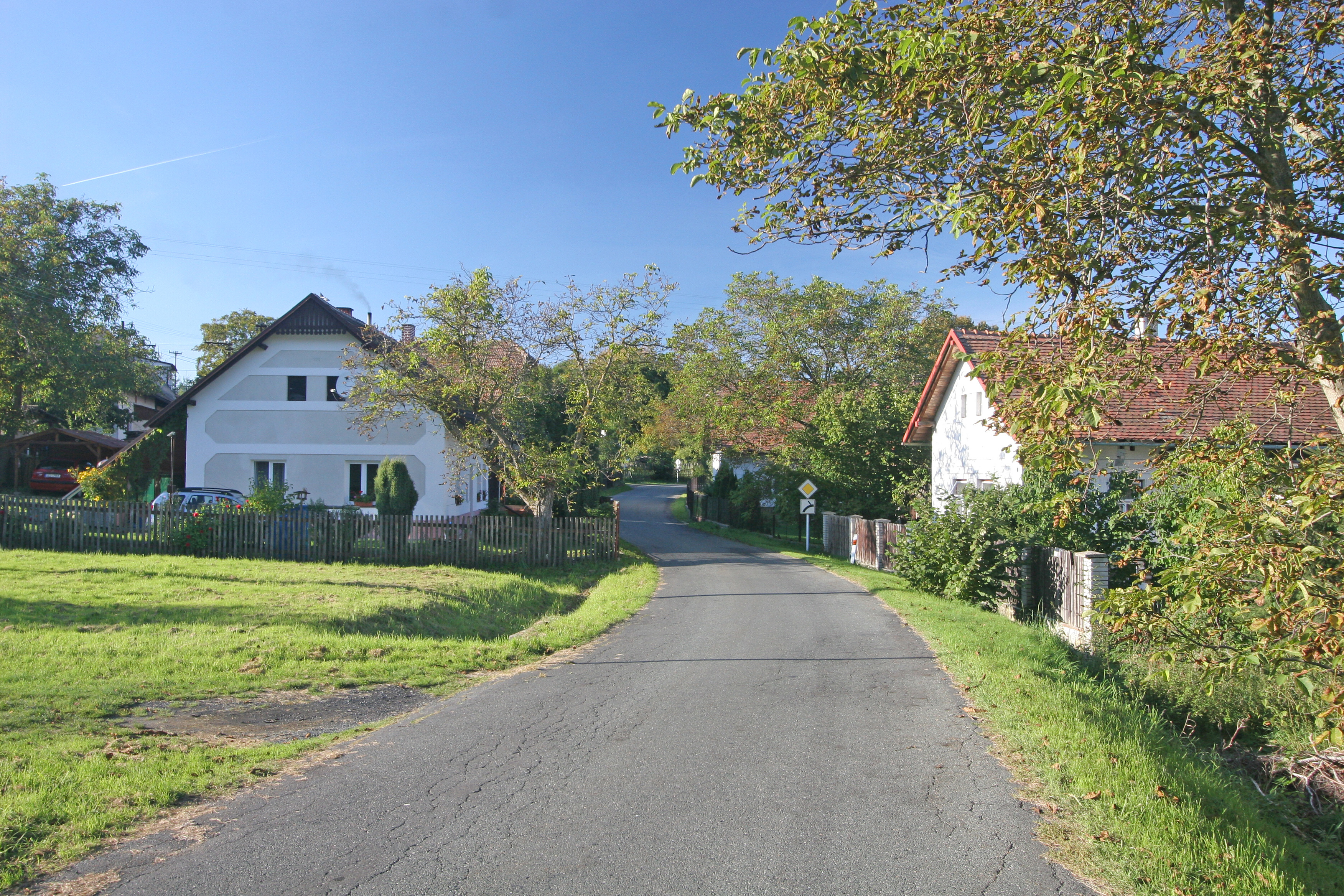 Jetonice čp. 13